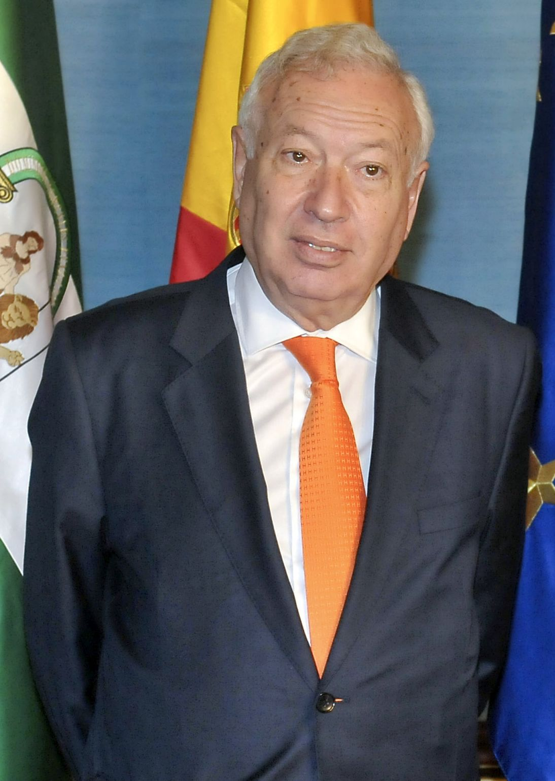 Ministro Exteriores-Garcia Margallo en octubre de 2013